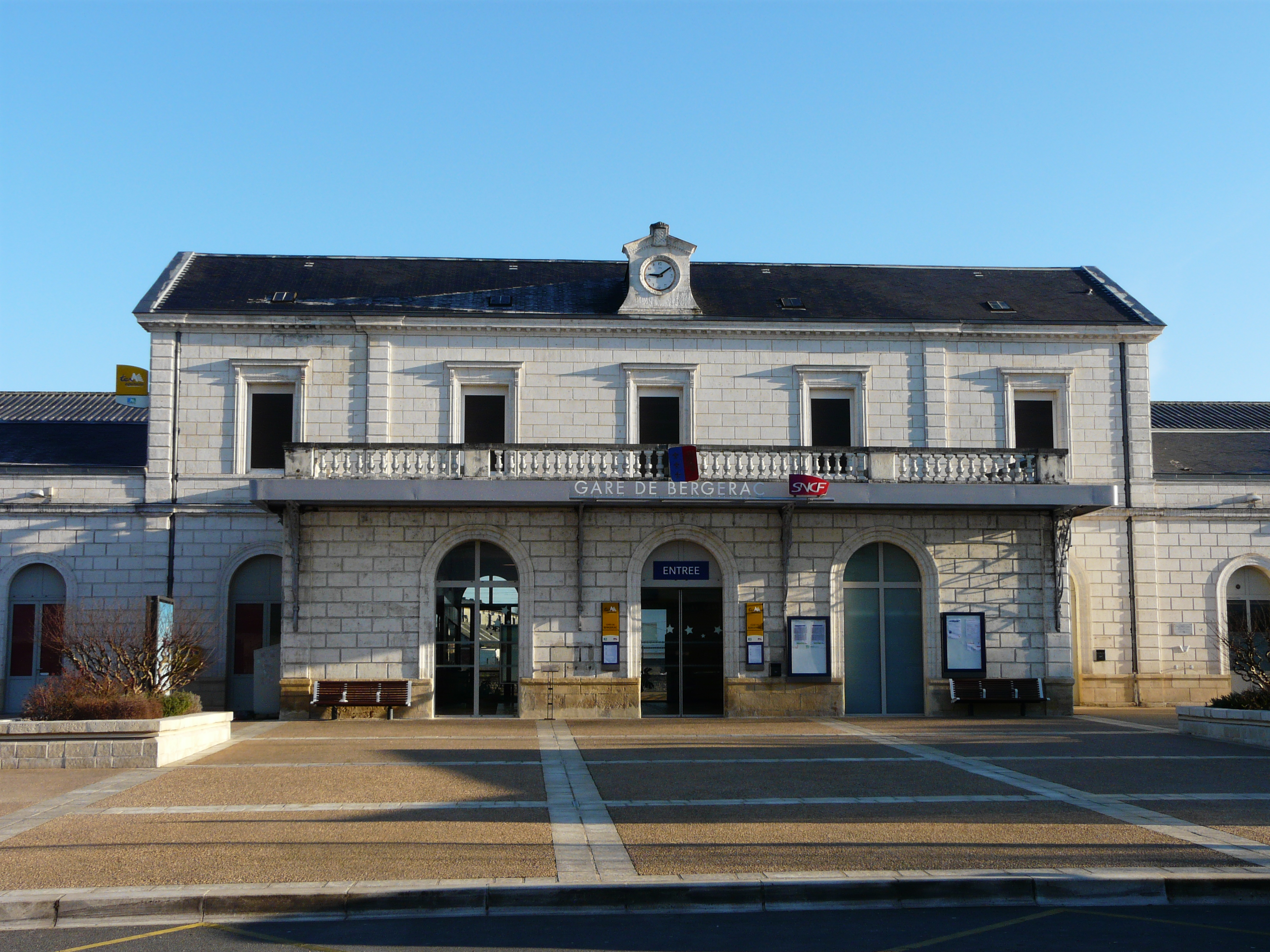 La gare de Bergerac, Dordogne, France.